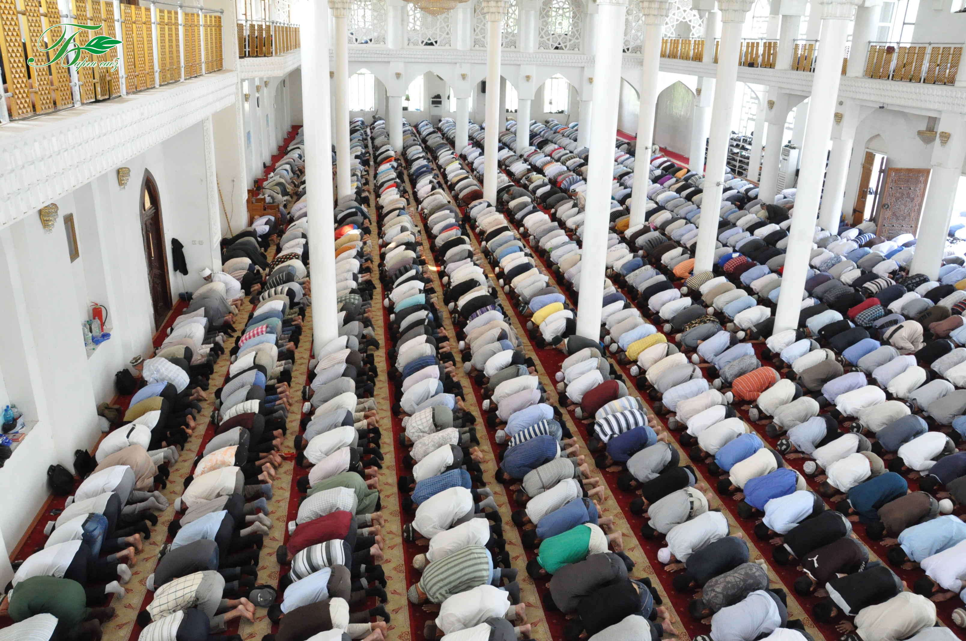 Тоҷикӣ: Намоз